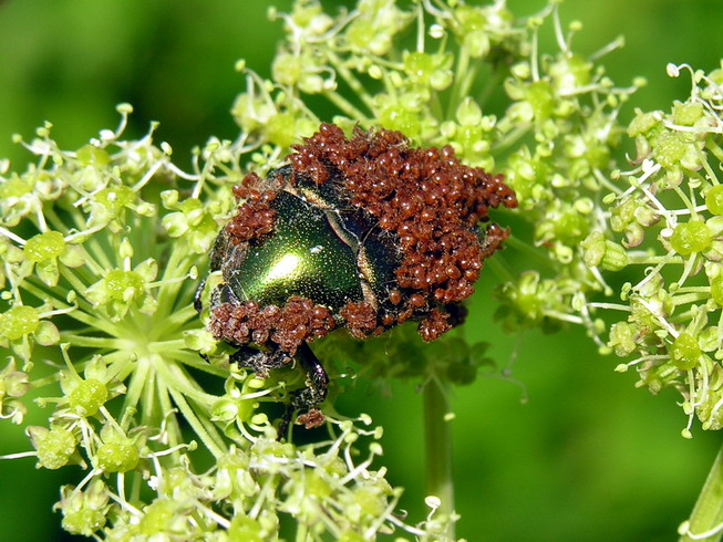 Parazitizmas, erkės užpuolusios bronzinuką (Cetonia aurata) Foto: Algirdas, 2006 m. birželio 25 d.